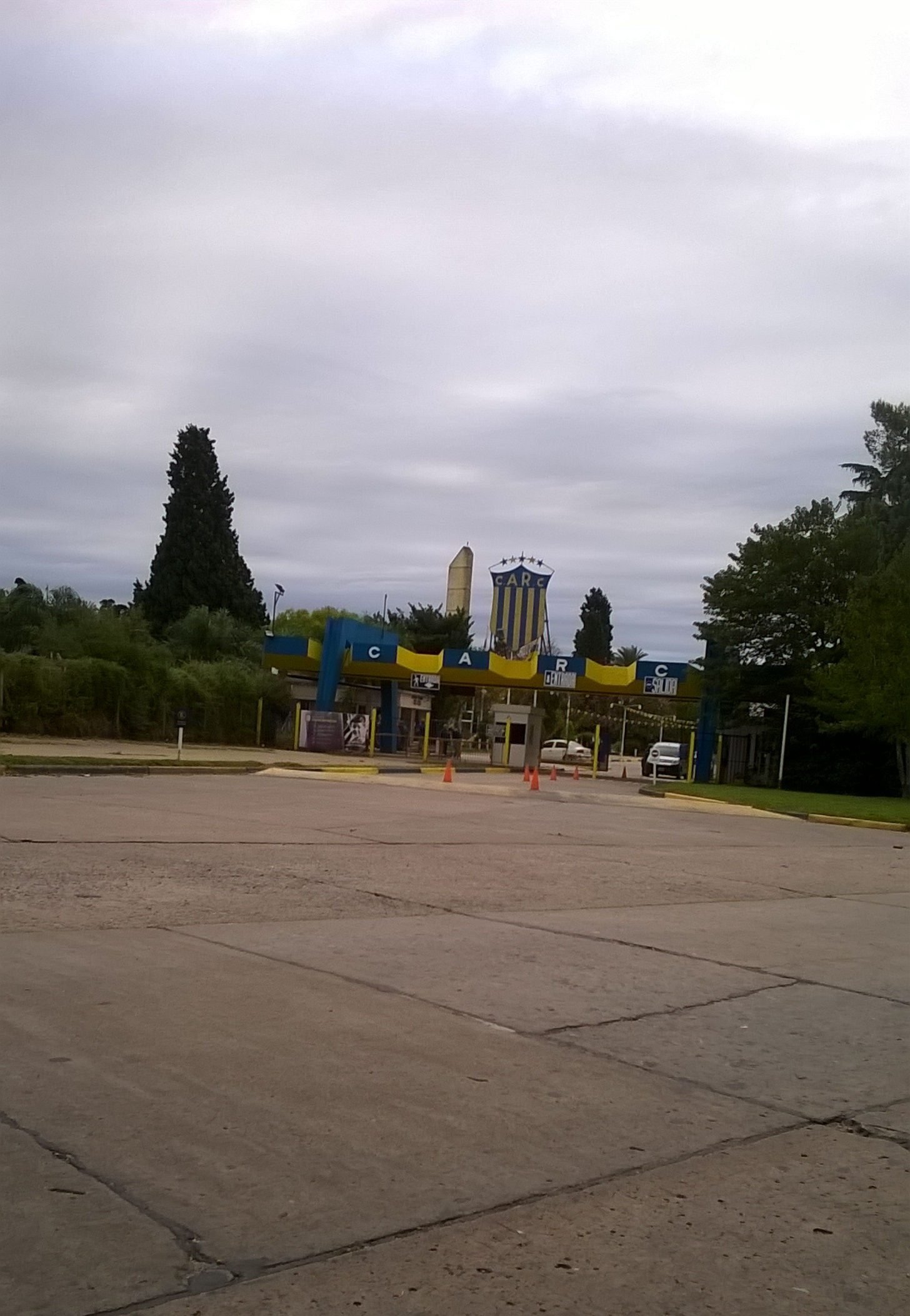 Fachada del ingreso a la Ciudad Deportiva Adolfo Pablo Boerio del Club Atlético Rosario Central, ubicada en la avenida Andrés Vietti 450 de la ciudad de Granadero Baigorria, Argentina.